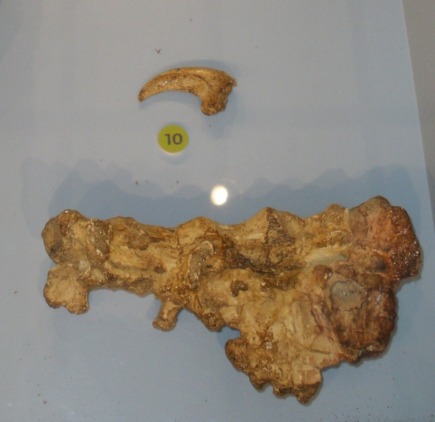 Fossil of Variraptor, a theropod dinosaur Took the photo at Musee d'Histoire Naturelle, Brussels